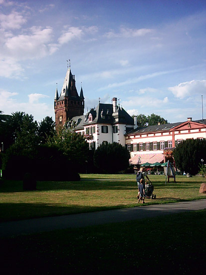 Weinheimer Schloss, vom Schlosspark aus gesehen. Schlossturm erbaut Freiherr Christian Friedrich Gustav von Berckheim